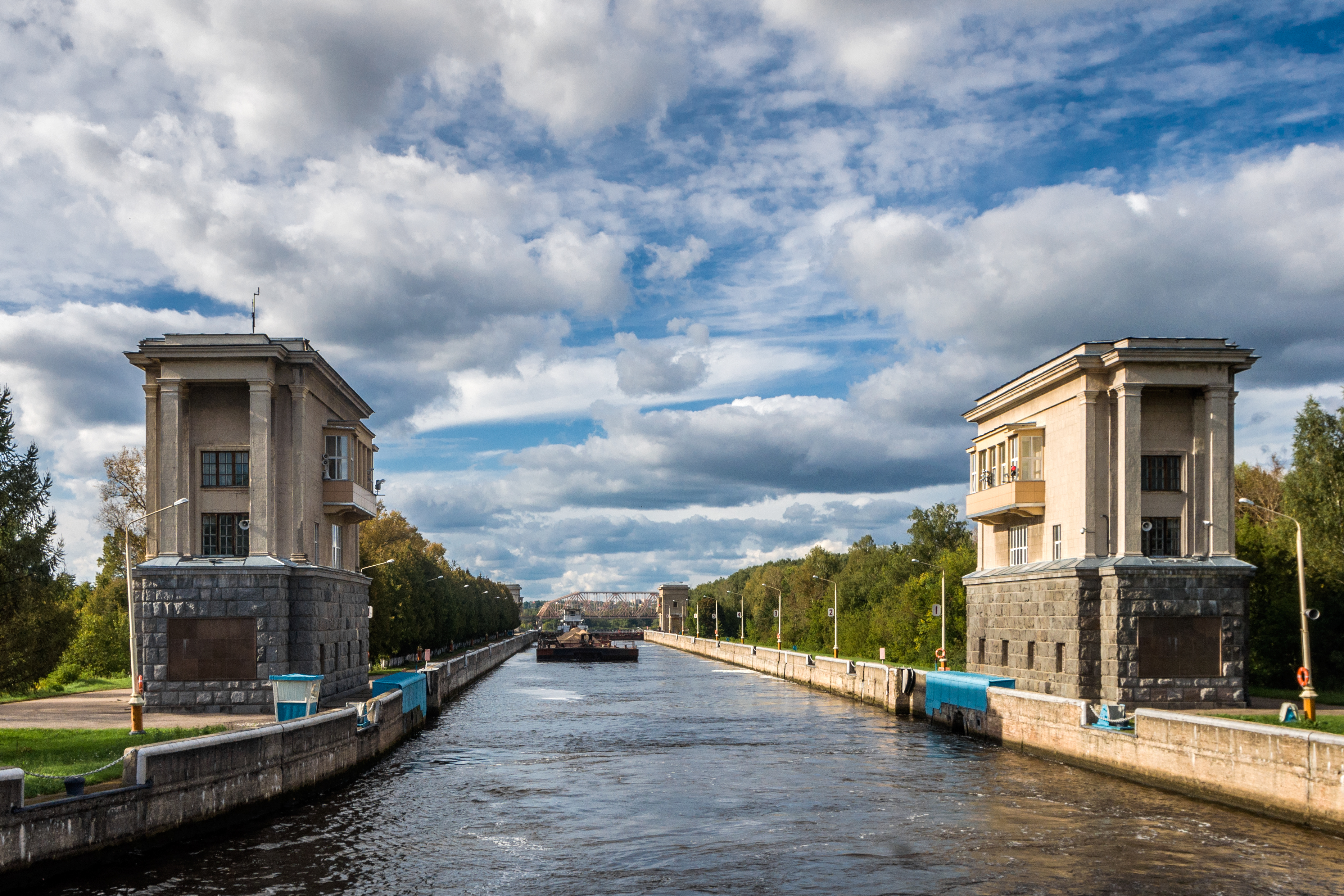 Шлюз № 4 канала им. Москвы: Деденево, Дмитровский район, Московская область